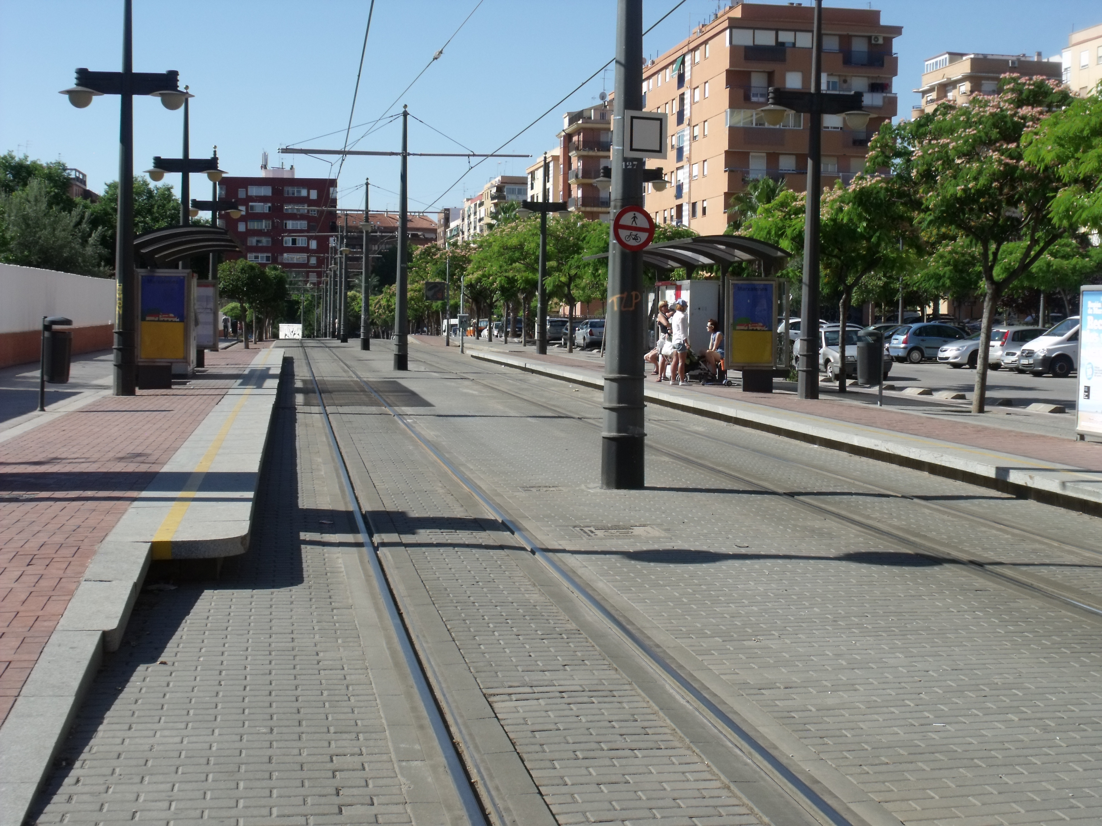 Tranvía en la calle Periodista Llorente, Valencia.